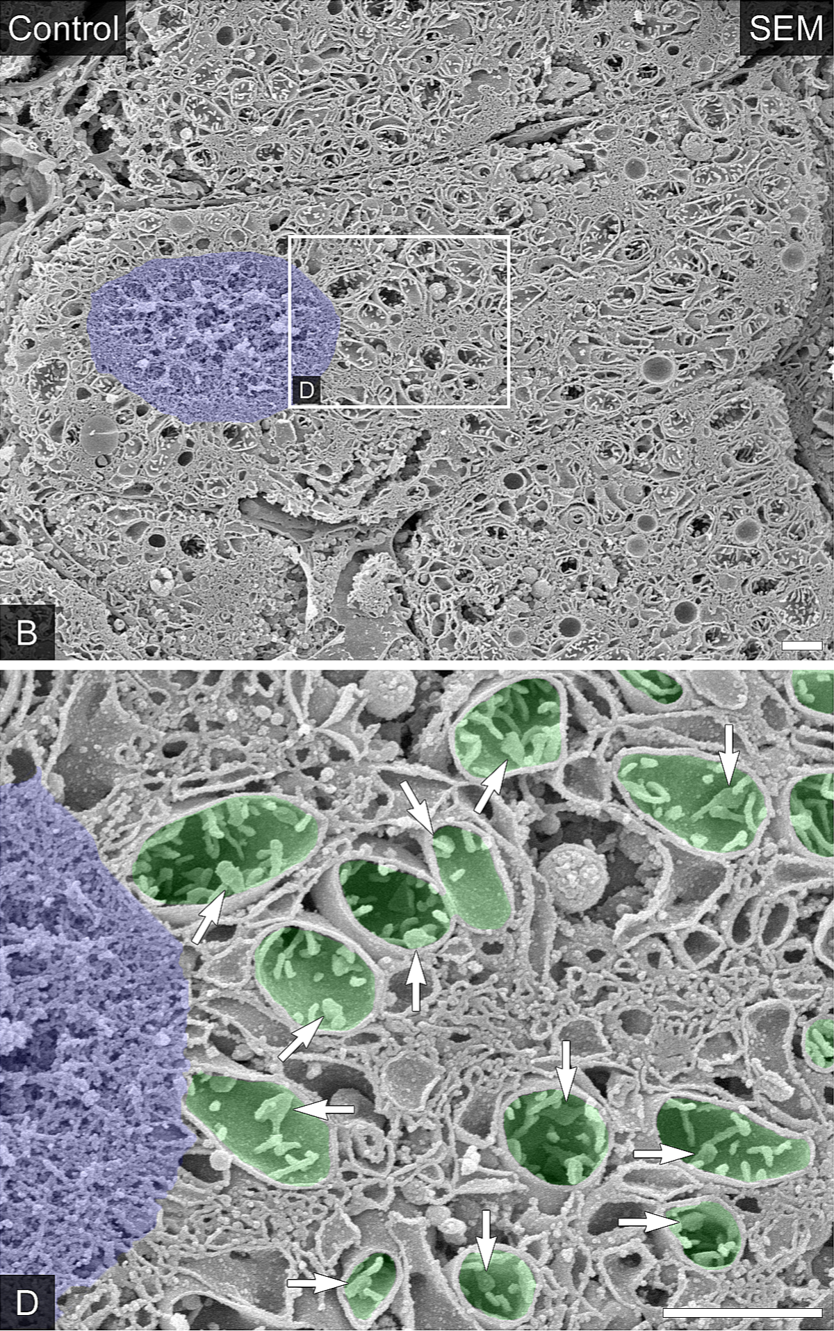 Fig. 2. La ultraestructura de la endomembrana en los hepatocitos del hígado de control. B y D) Se observan hepatocitos típicos similares en tejidos de hígado de cerdo de control, macerados con osmio con un microscopio electrónico de barrido B) El núcleo es de color azul. El área parcial indicada en B se fotografió adicionalmente con un aumento mayor (D). El núcleo es de color azul y las mitocondrias son de color verde. Las flechas abiertas indican cristales de mitocondrias. Barra de escala= 1 μm.